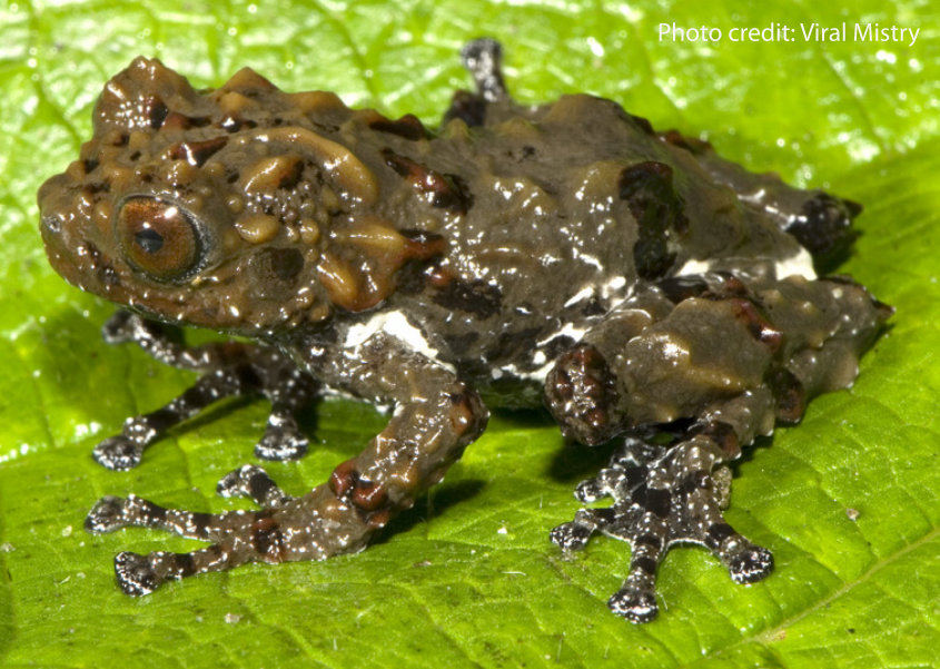 Cut out of image File:Reptiles and amphibians of Pakke Tiger Reserve.pdf